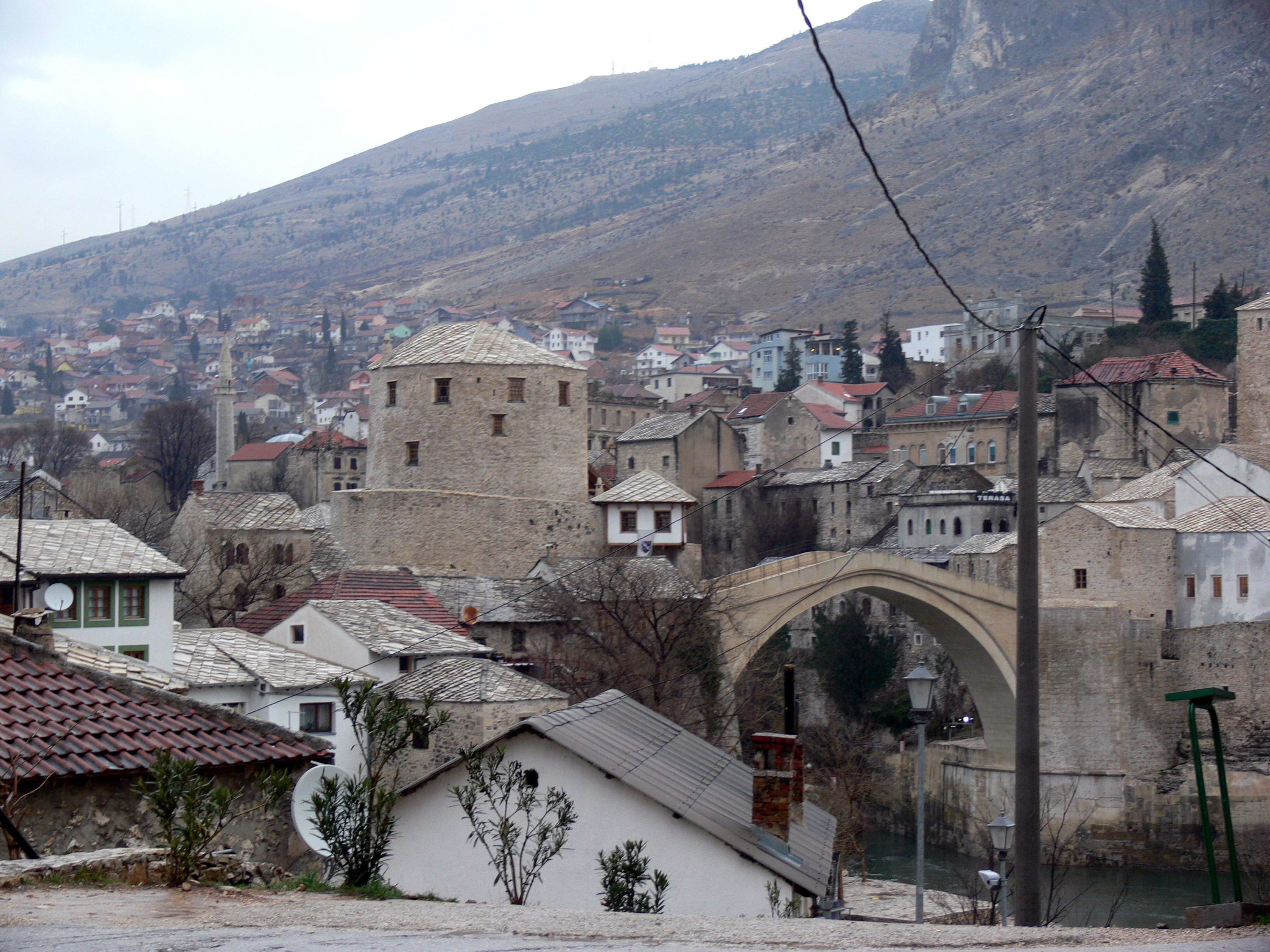 Mostar.